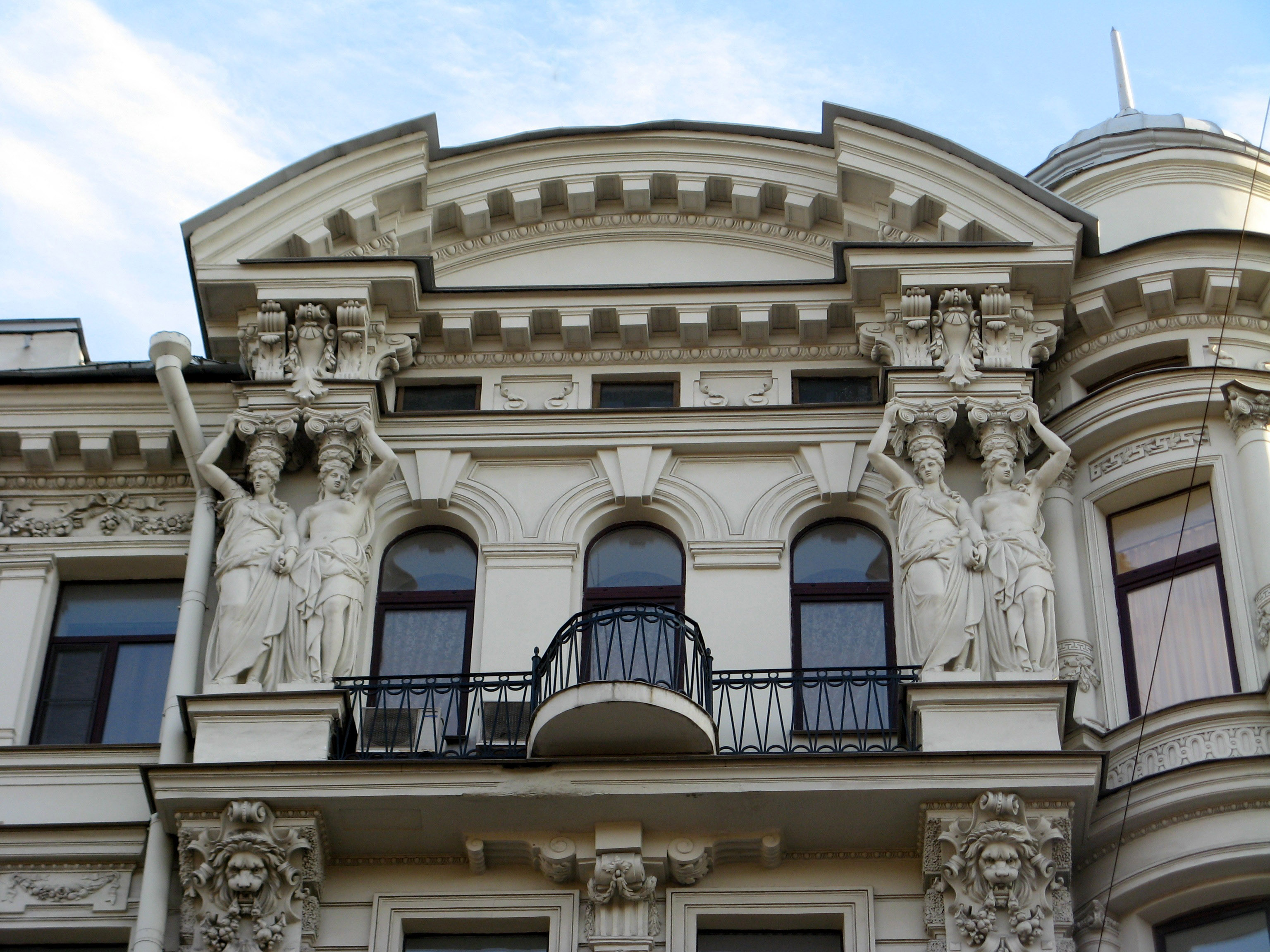 Доходный дом купца Е. С. Егорова, Санкт-Петербург